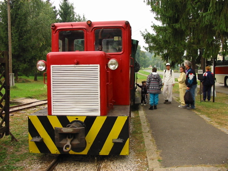 C50-es dízelmozdony a Felsőtárkányi Állami Erdei Vasúton.